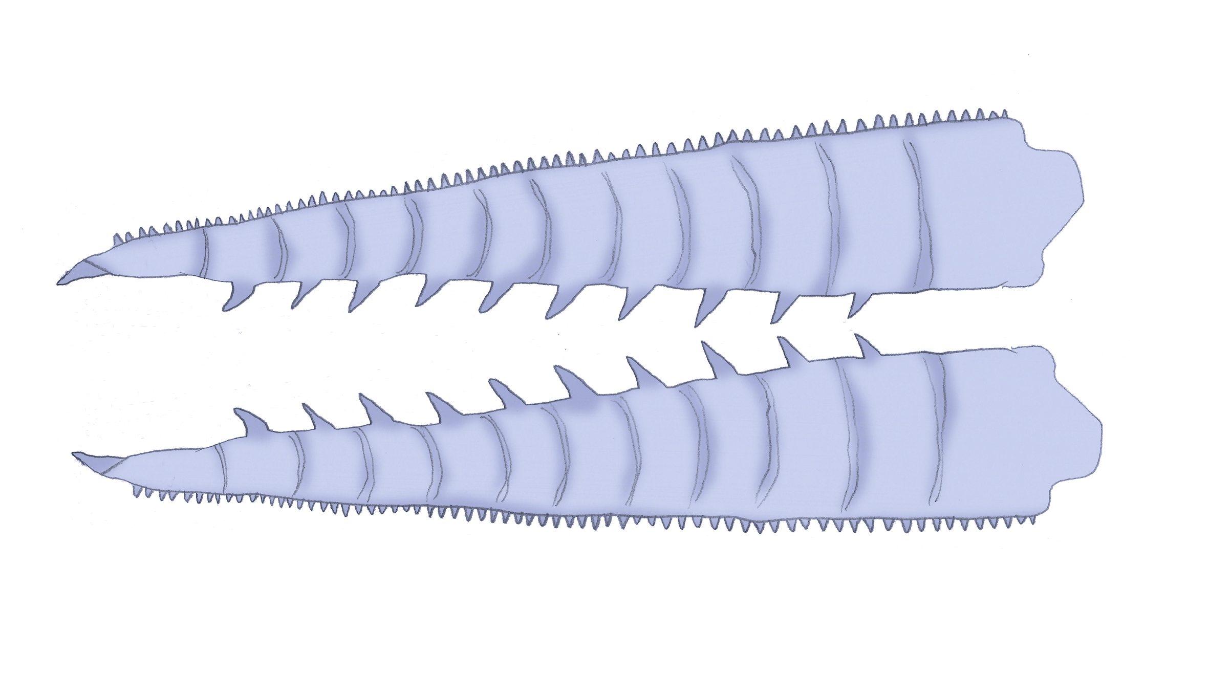 Appendages of Caryosyntrips serratus